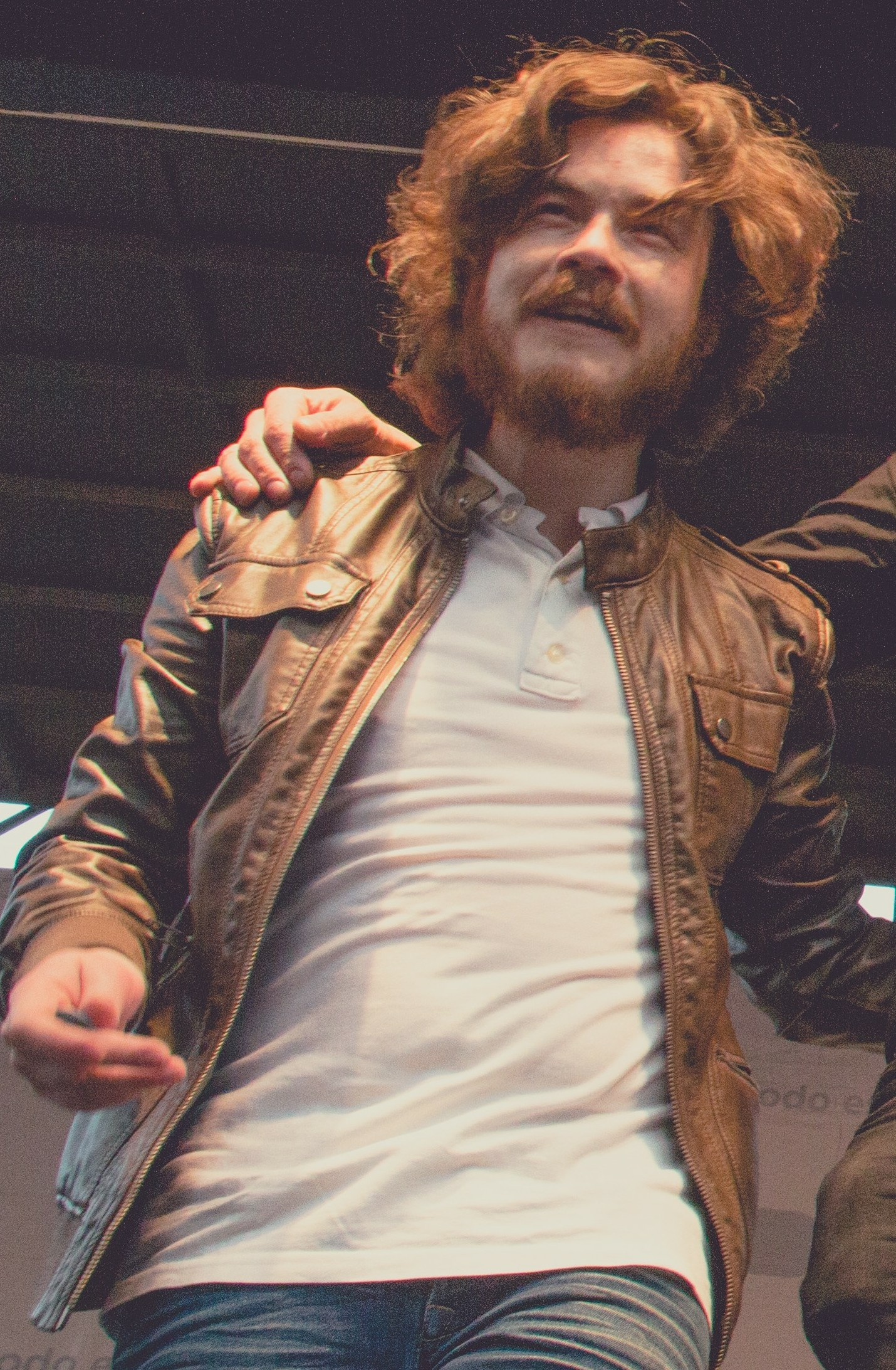 En Buenos Aires celebra Chile